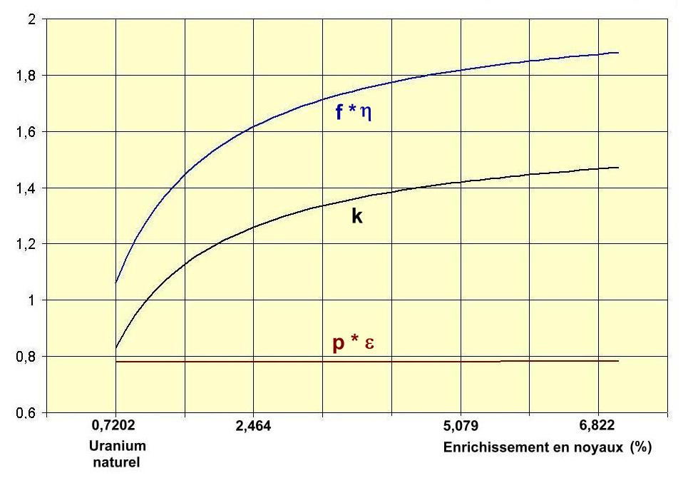 Français cadien: Evolution de k infini en fonction de l'enrichissement du coeur